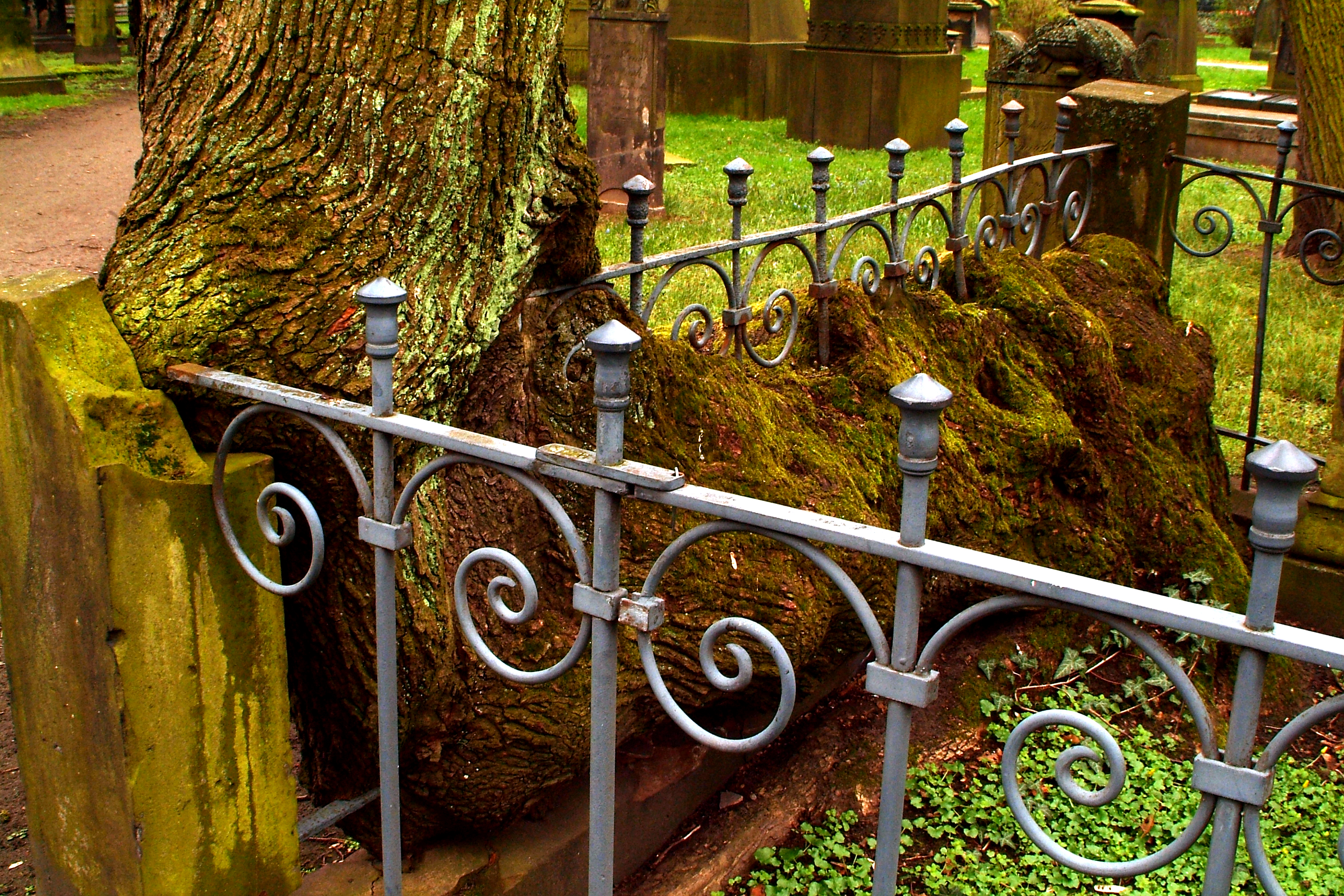 Der anfangs horizontal gewachsene Ahornbaum, der die Einfriedung des Grabmales von Heinrich Bernhard Röhrs dann teilweise vollständig in seinen Stamm integriert hat; hier in einer Ansicht vom Fußende des Grabes